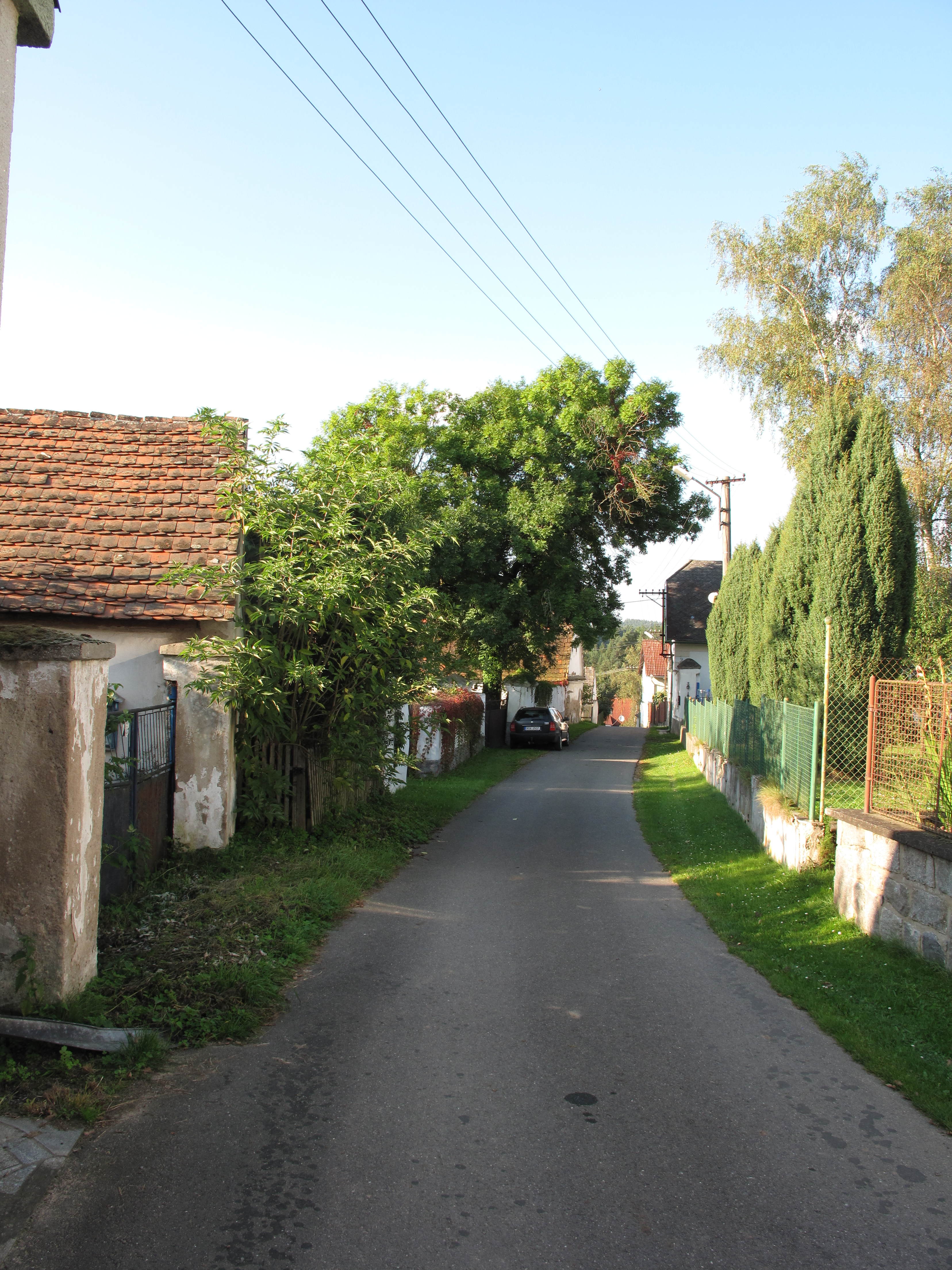 Silnice u cesty. Okres Strakonice, Česká republika.